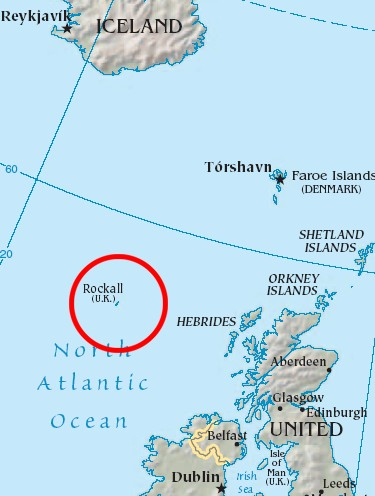 Karte zur geographischen Lage von Rockall Beschreibung: Karte zur geographischen Lage von Rockall Quelle: Eigene Bearbeitung von